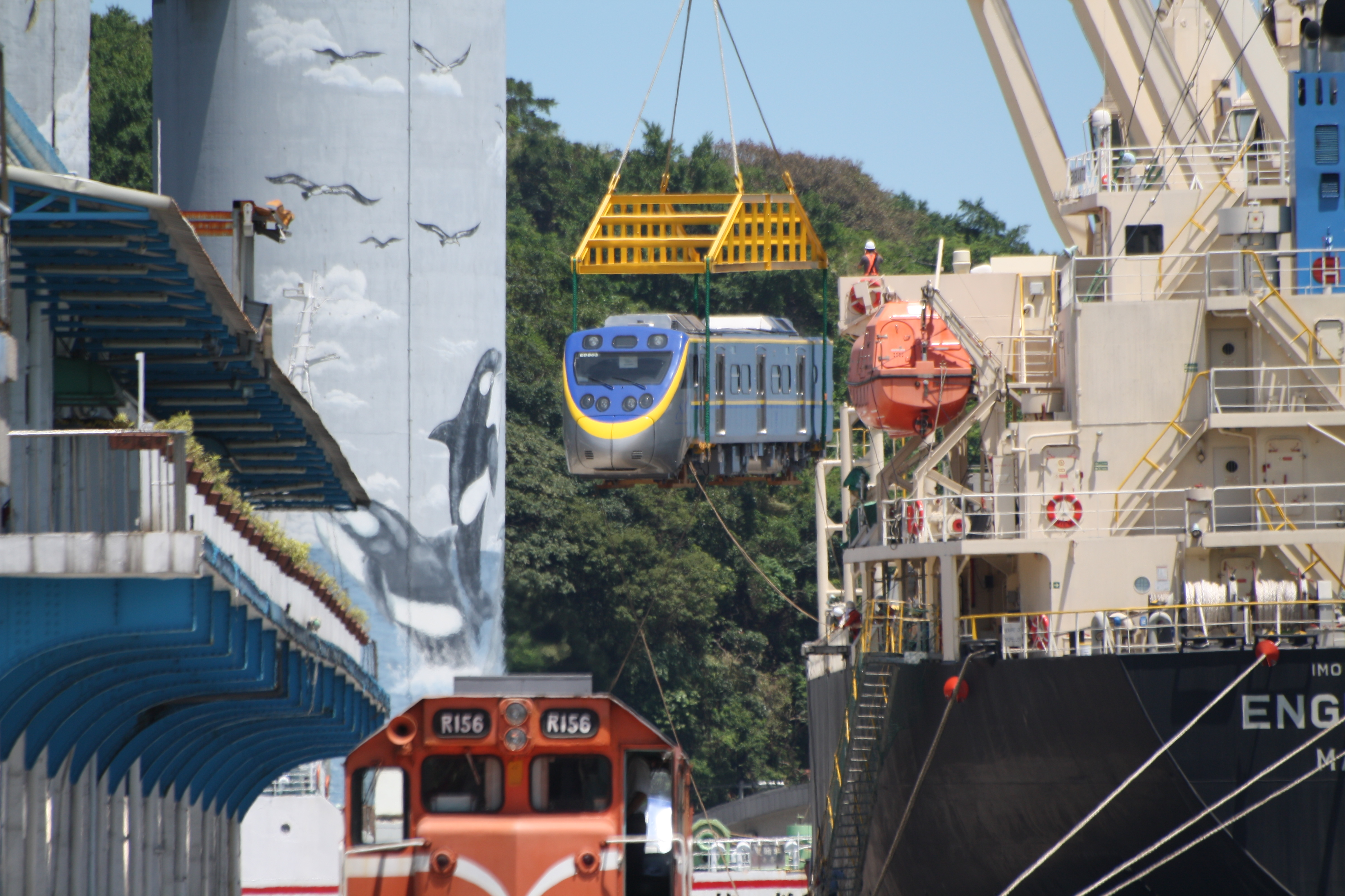 台灣鐵路局(路局)採購之EMU800列車(日本車輛示範組裝版)